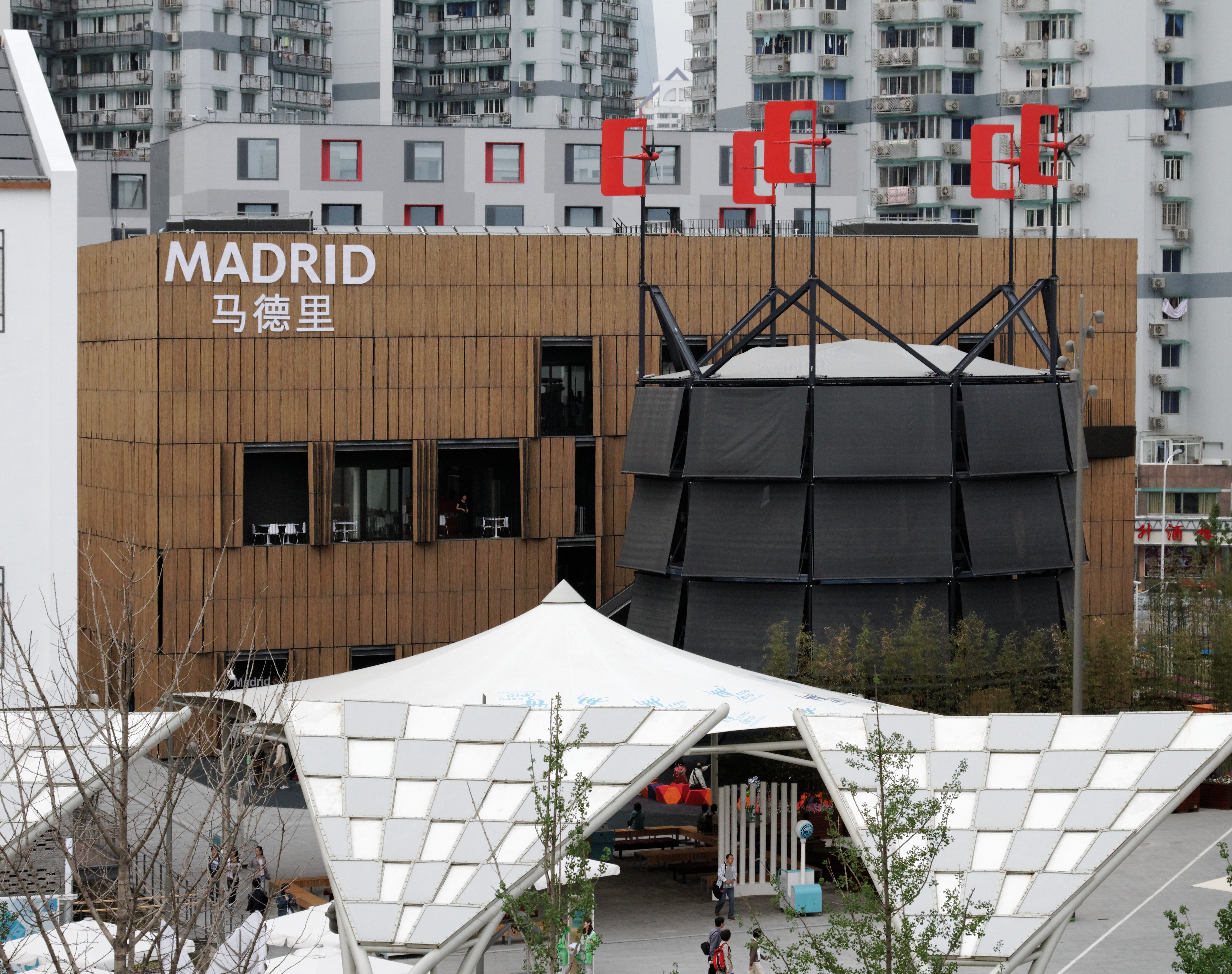 Madrid Case Pavilion, Urban Best Practices Area, Expo 2010